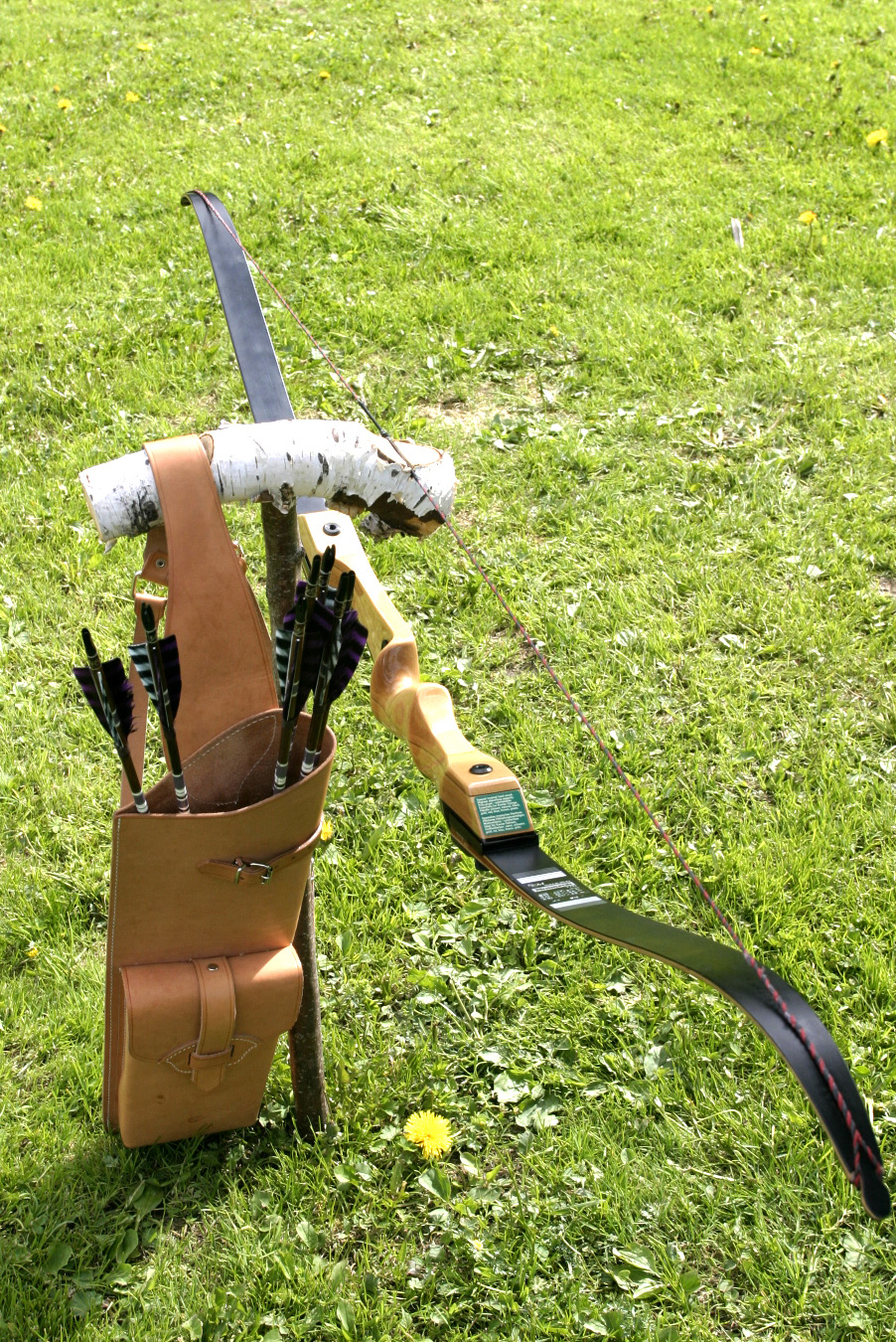 Recurvebogen mit Zubehör